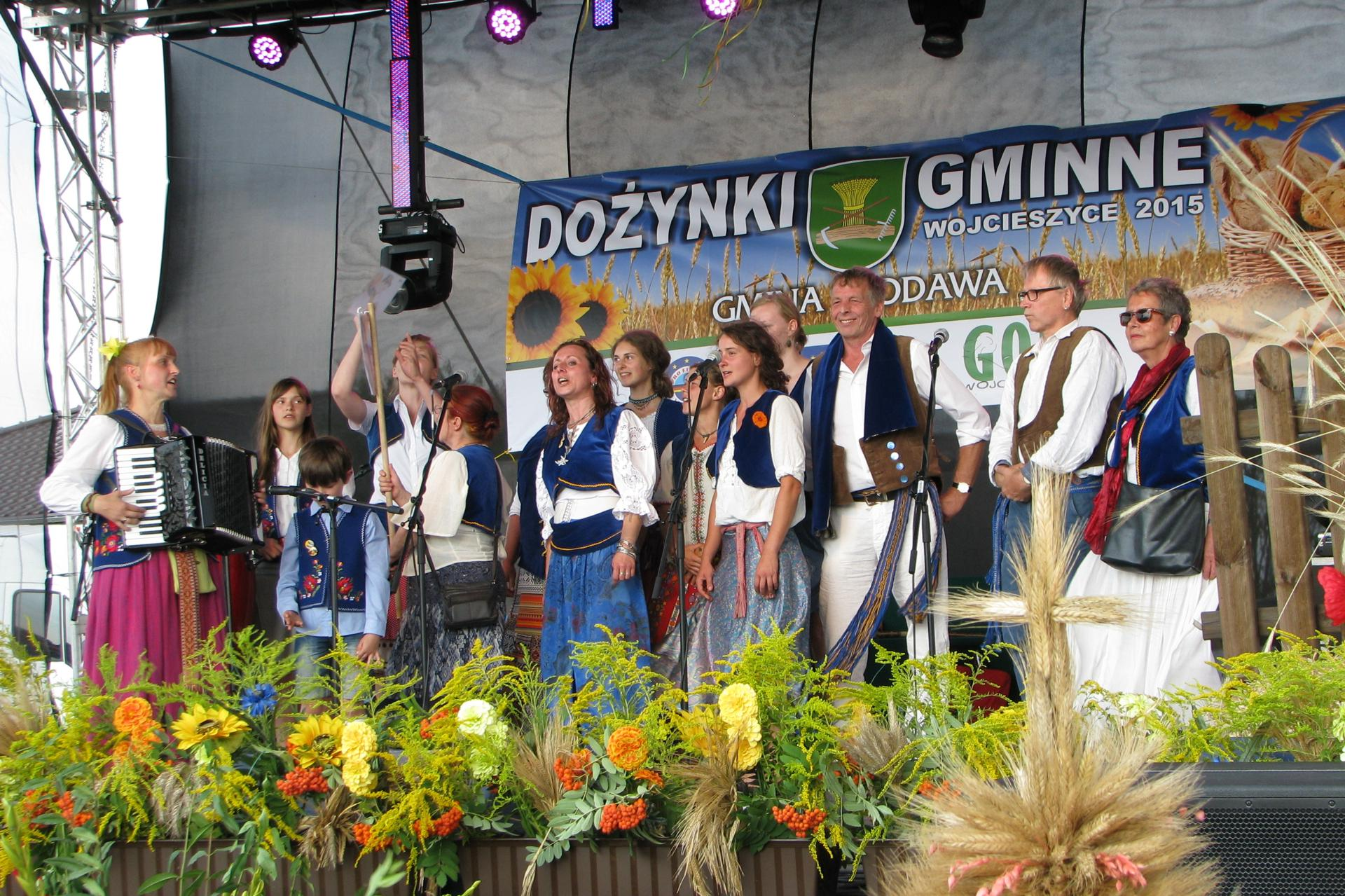 Występ niemieckiego zespołu Kariolle na dożynkach w Wojcieszycach 23.08.2015